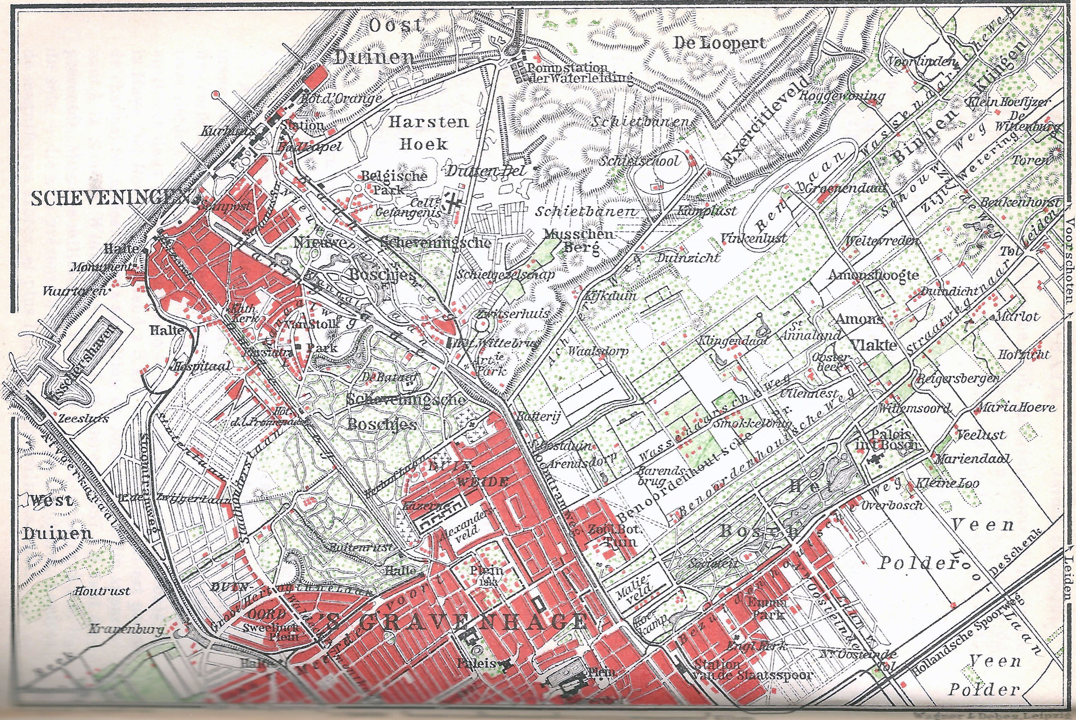 Scheveningen en Den Haag in 1905. Er zijn twee stoomtramlijnen en een kanaal naar Scheveningen